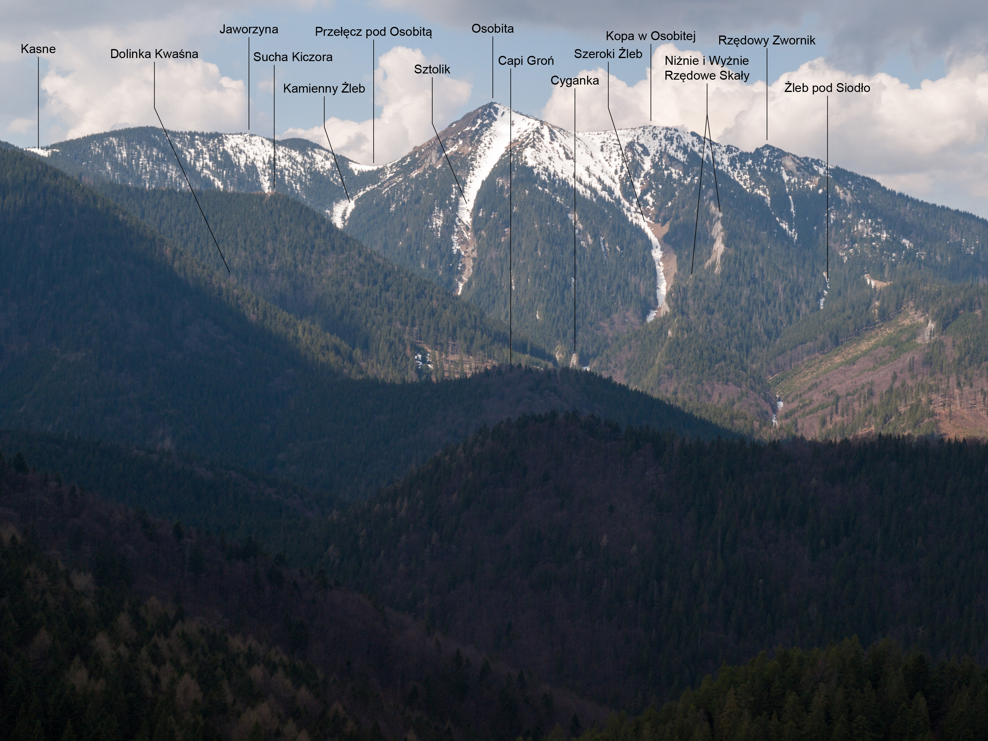 Masyw Osobitej widziany od wschodu (z Turka), podpisy.